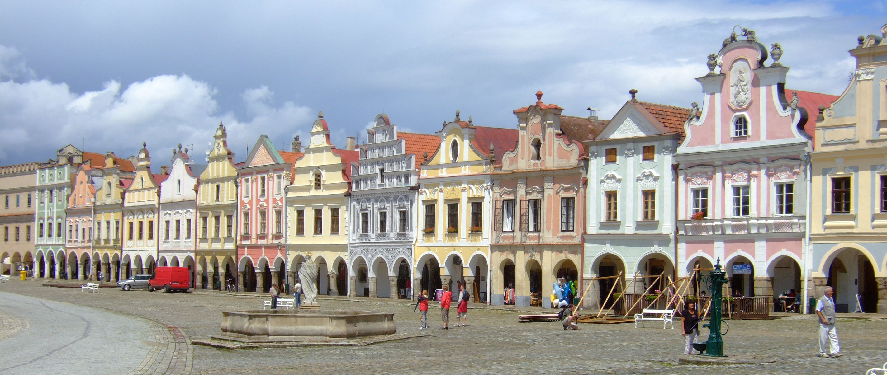 Telč: Marktplatz (2009)